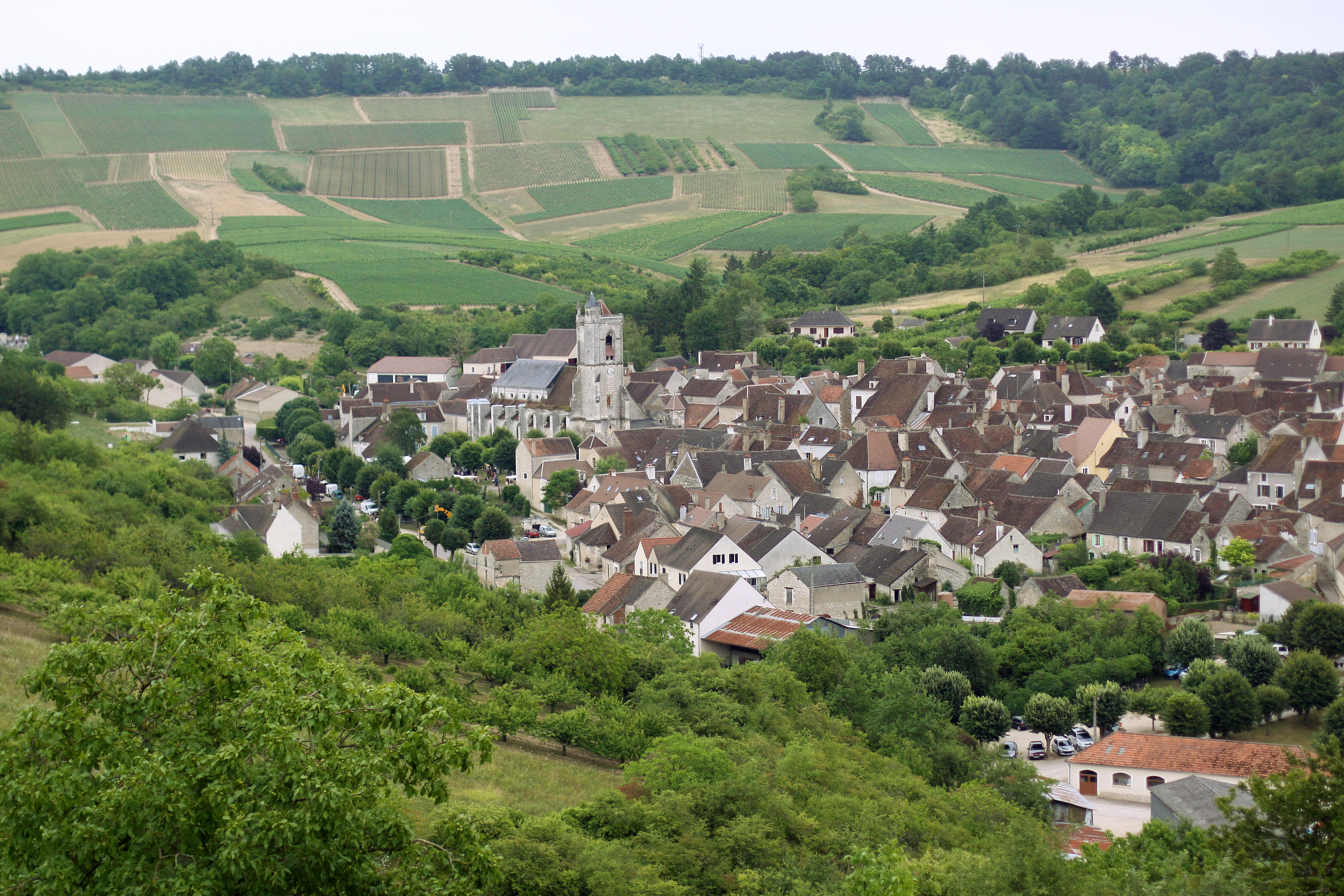 Irancy, vu depuis le versant Nord/Ouest